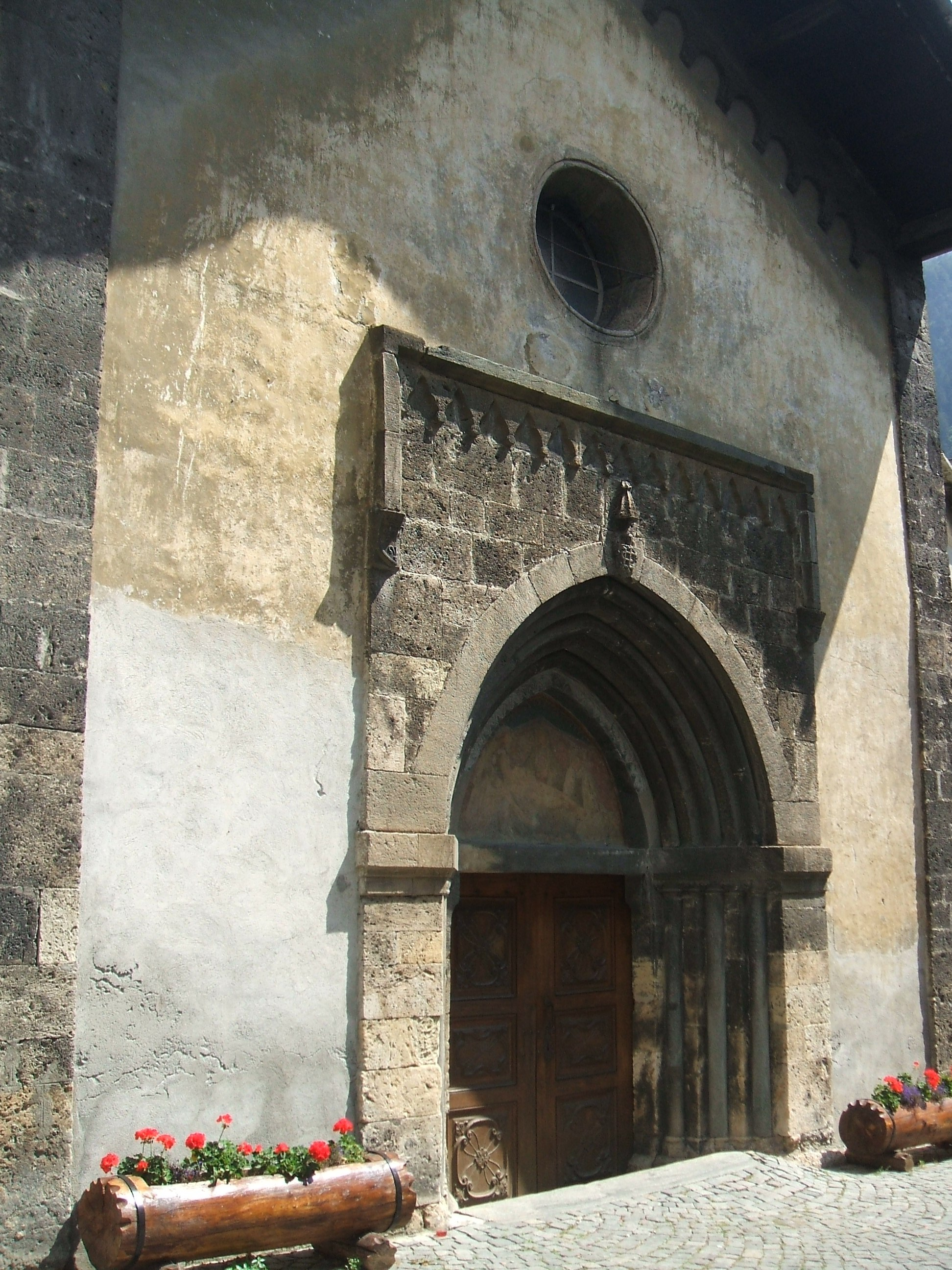 Chiesa parrocchiale di Exilles